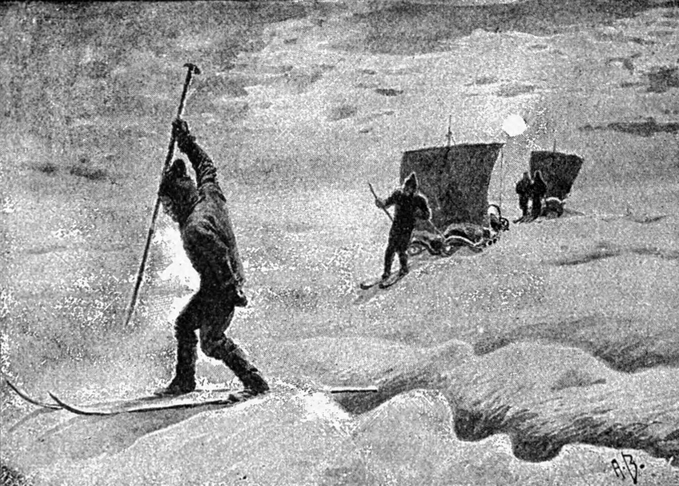 Участники гренландской экспедиции Нансена во время ночного марша.